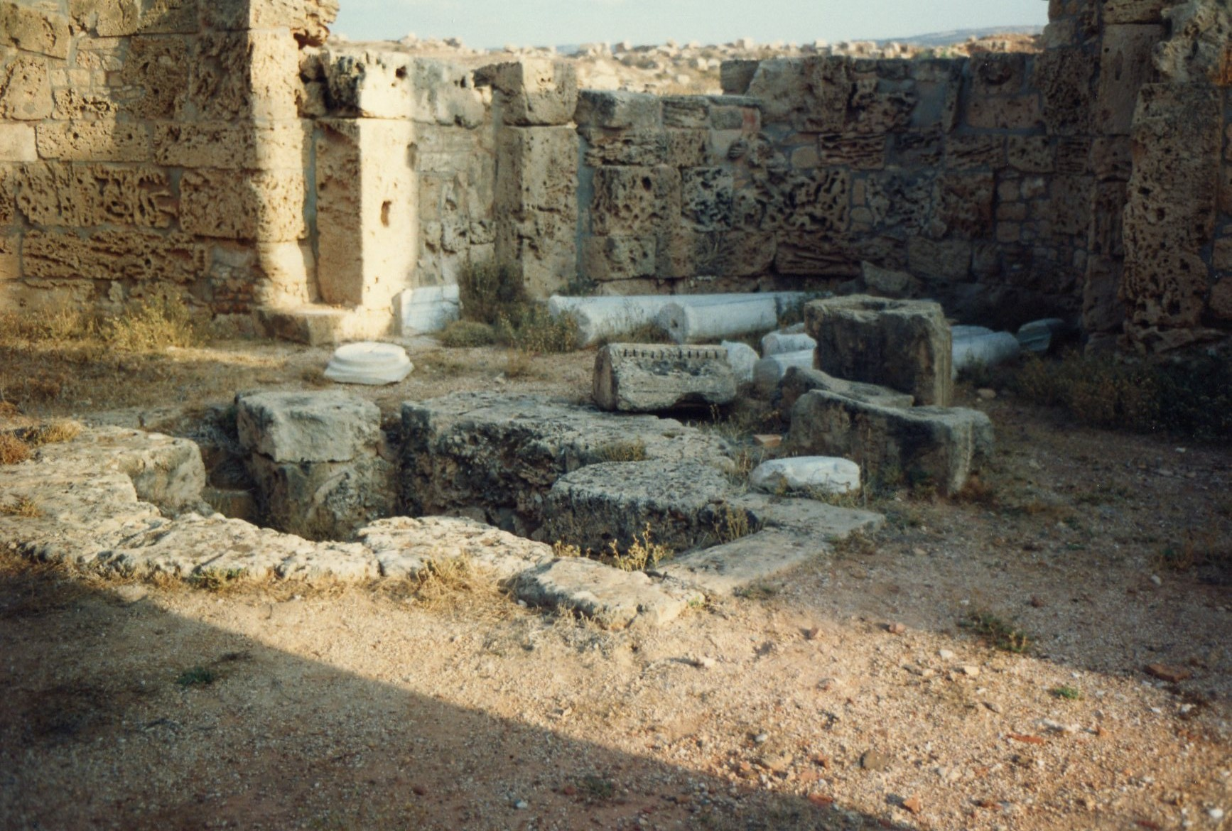 Apollonia, baptistère de l'église orientale